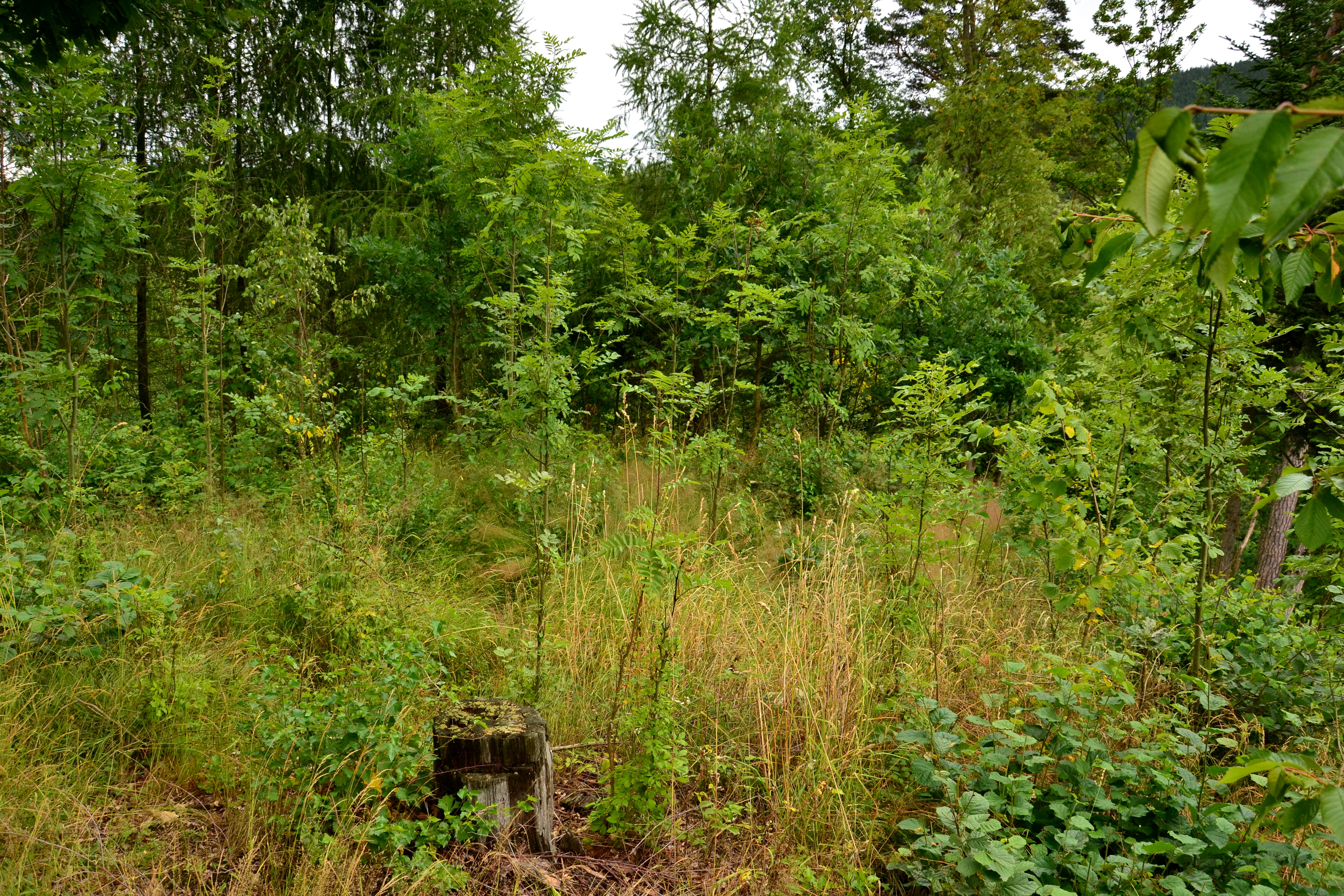 Zarůstající hradní jádro